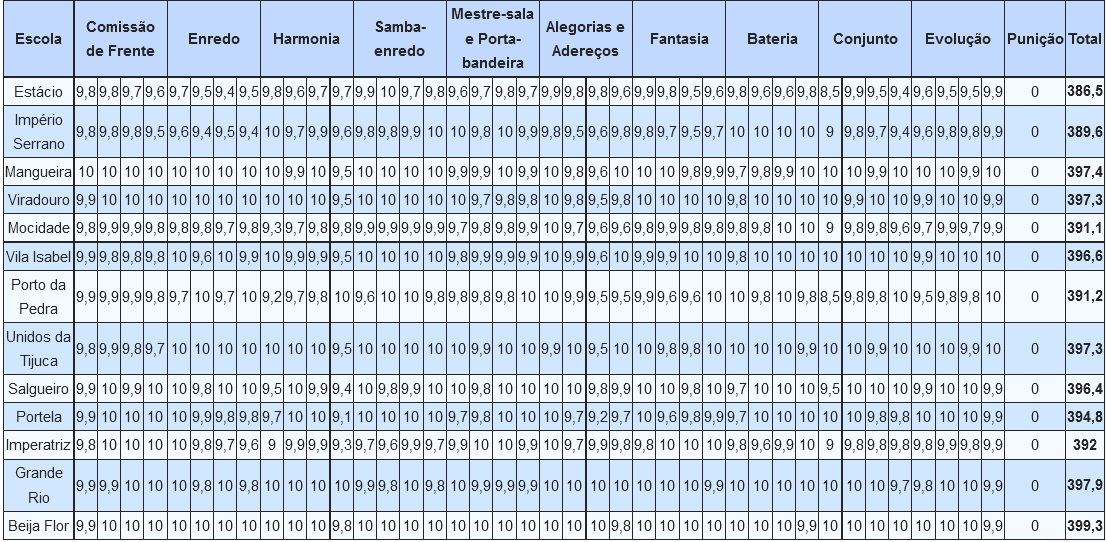 Resultados do Carnaval do Rio - 2007